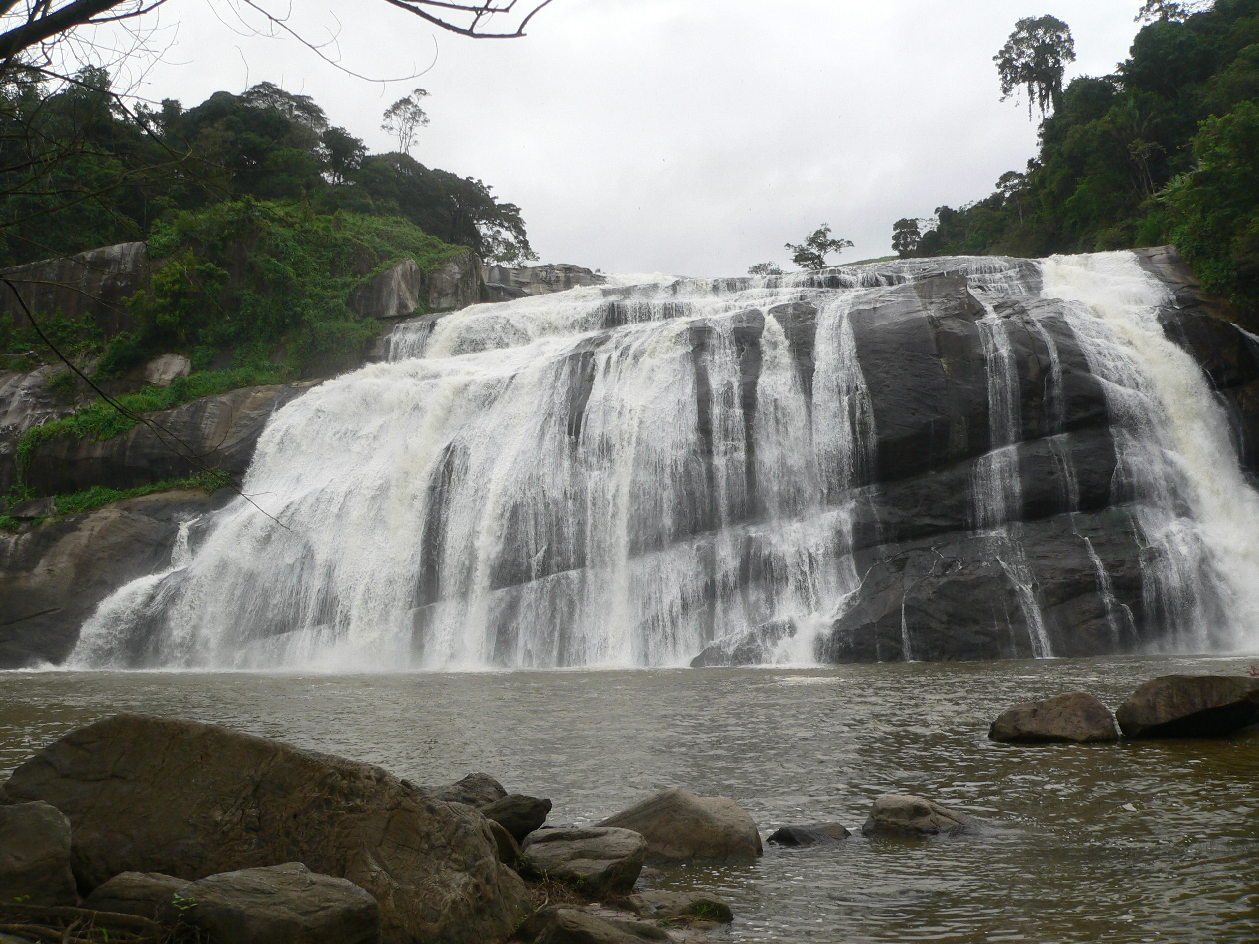 Cachooeira do urubu no rio Amaragi-Pernanbuco